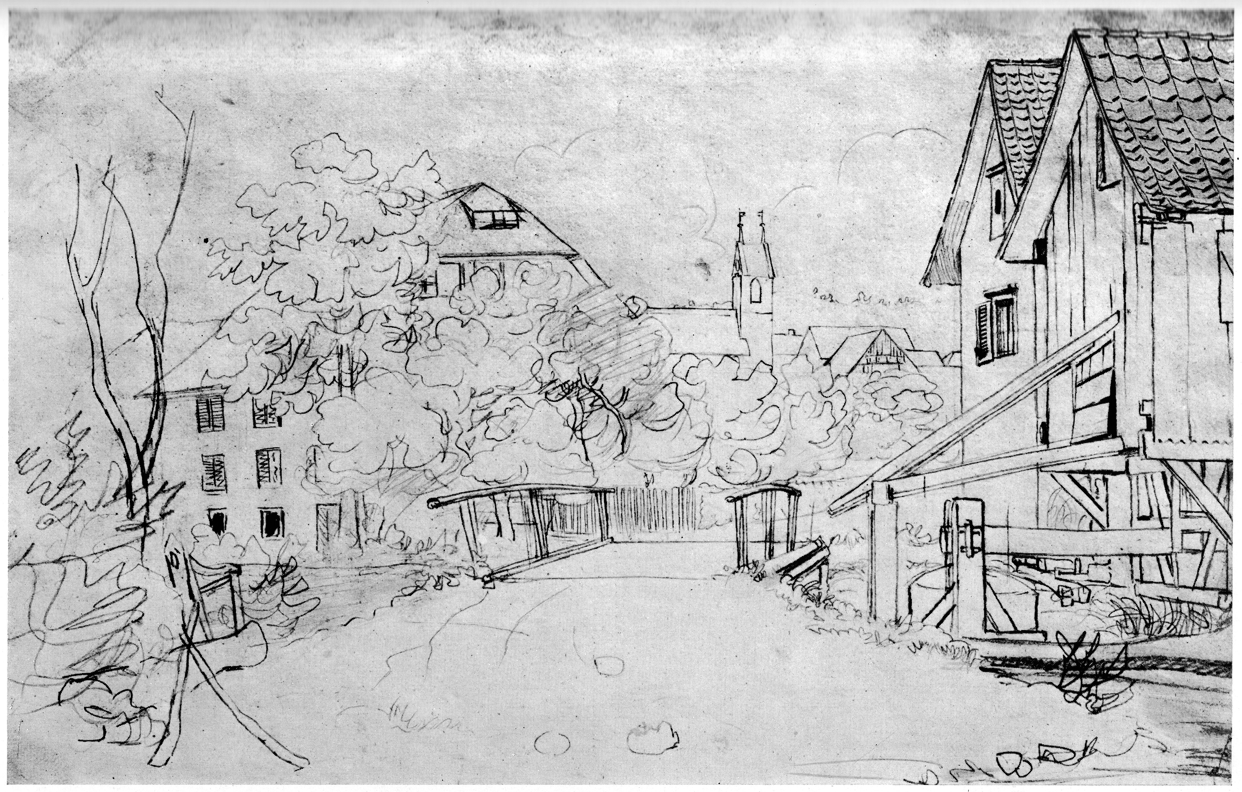 Dorffkern von Glattfelden auf einer Zeichnung Gottfrid Kellers von 1834.